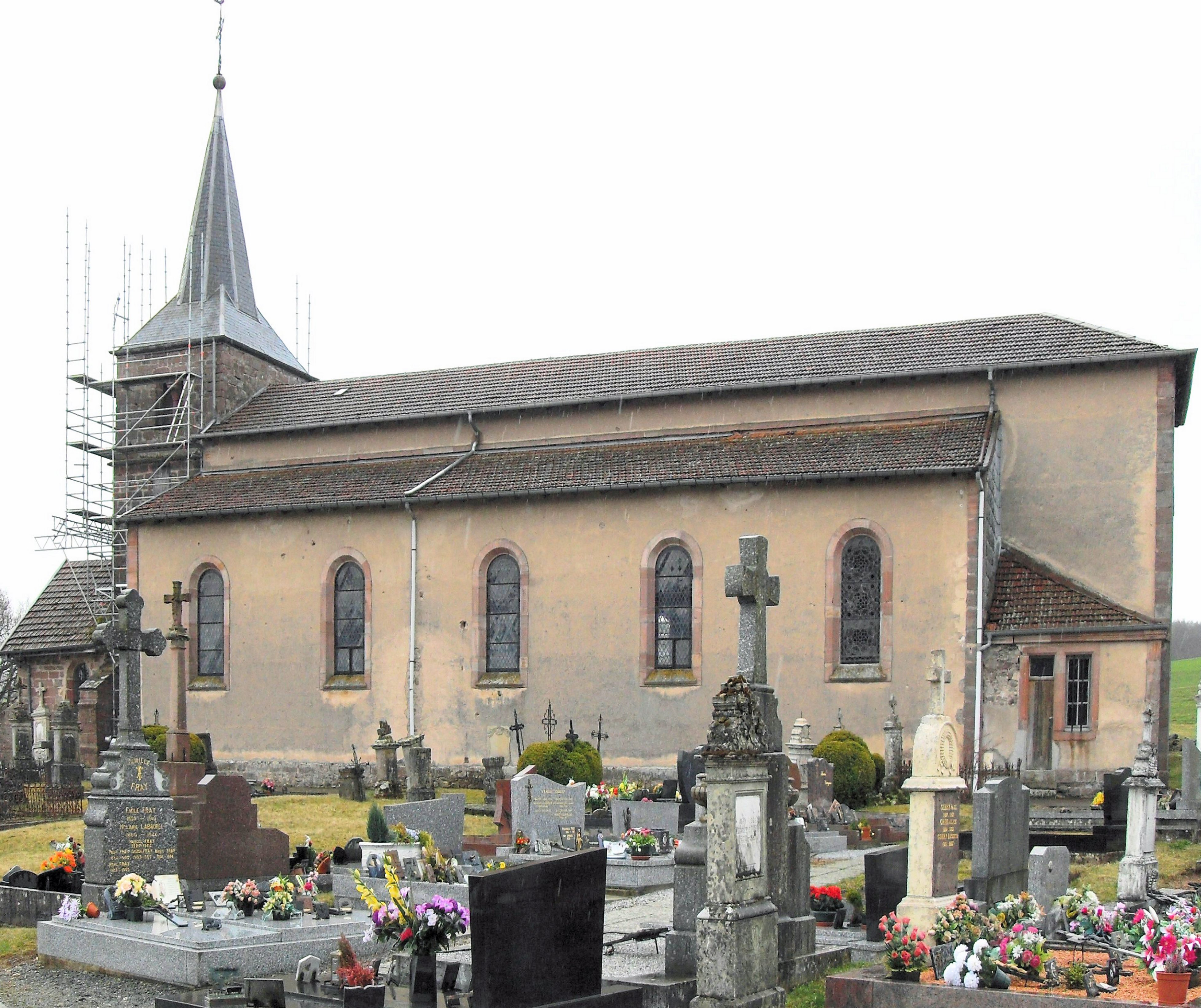 L'église Saint-Jacques à Chapelle-devant-Bruyères